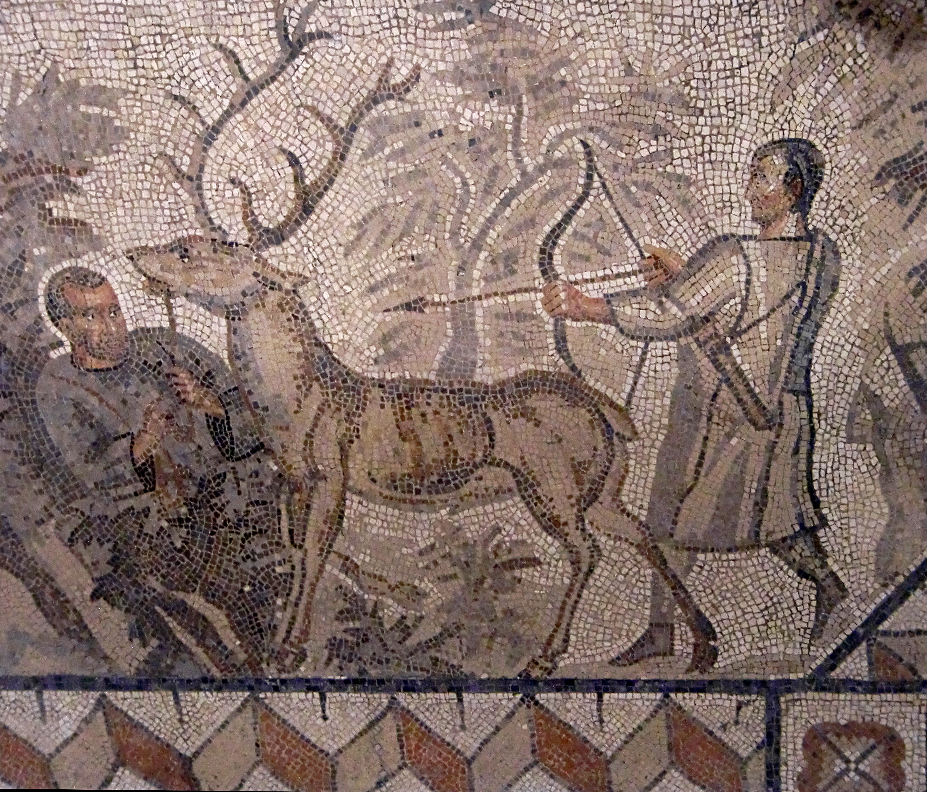 Mosaïque de Lillebonne - détail